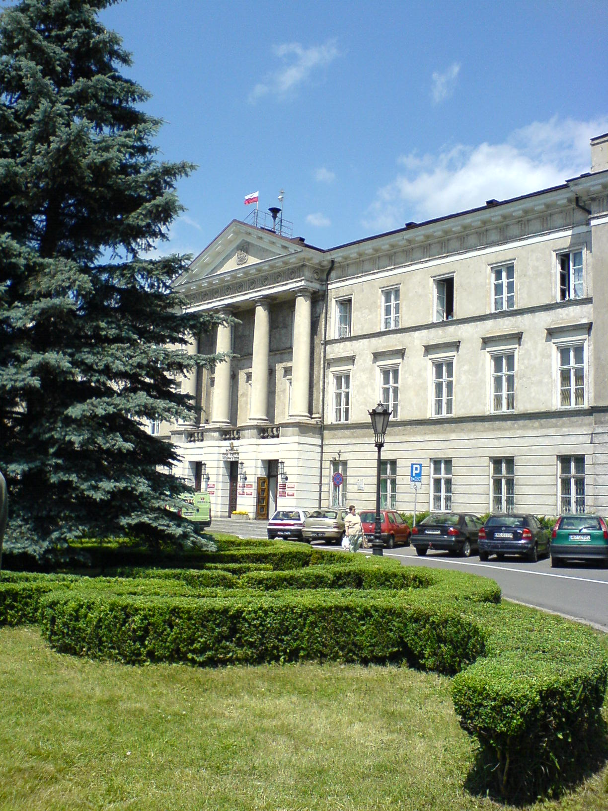 Delegatura Mazowieckiego Urzędu Wojewódzkiego w Radomiu